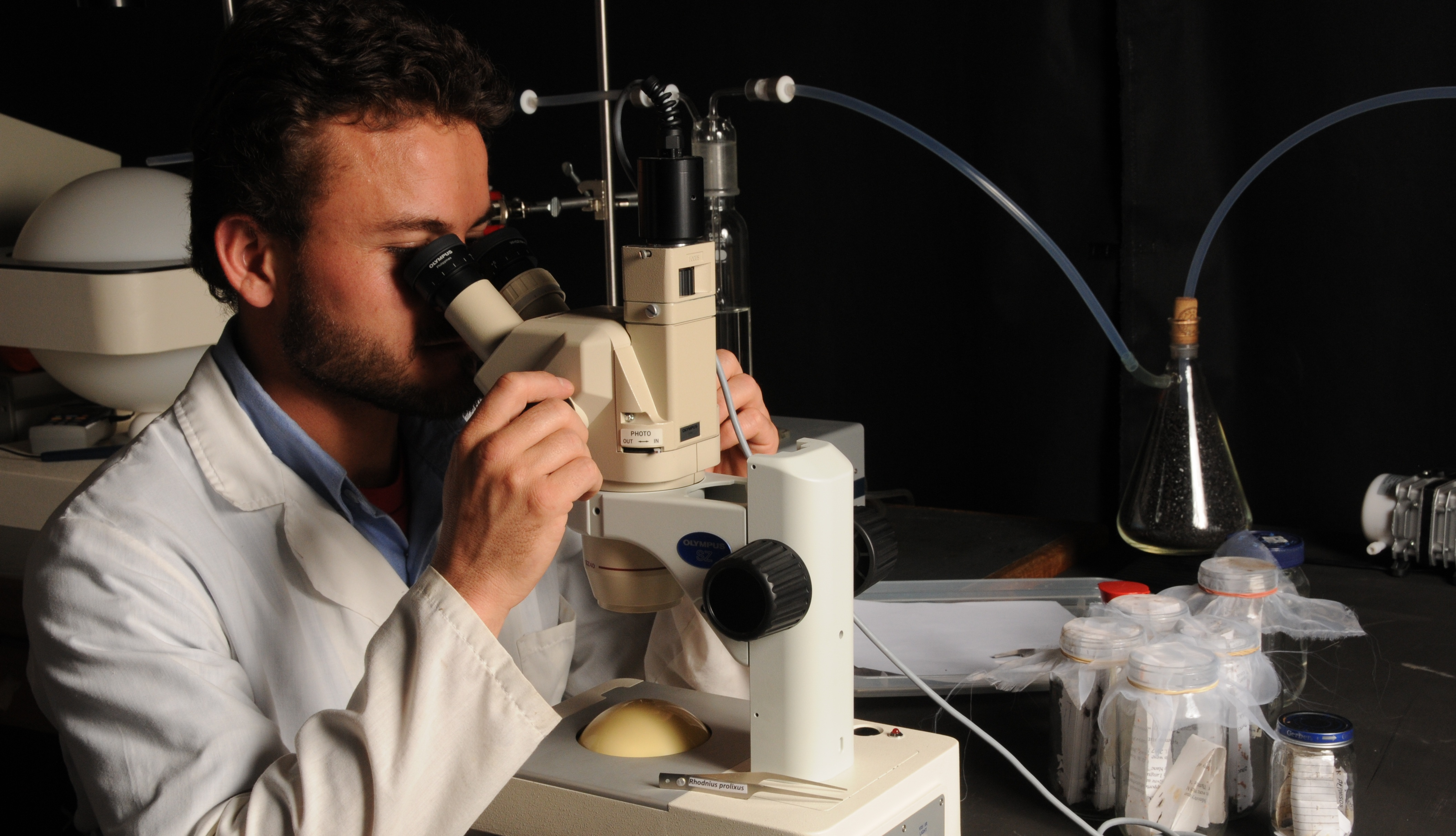 Investigador Lab EcoSen observando comportamiento de broca del café